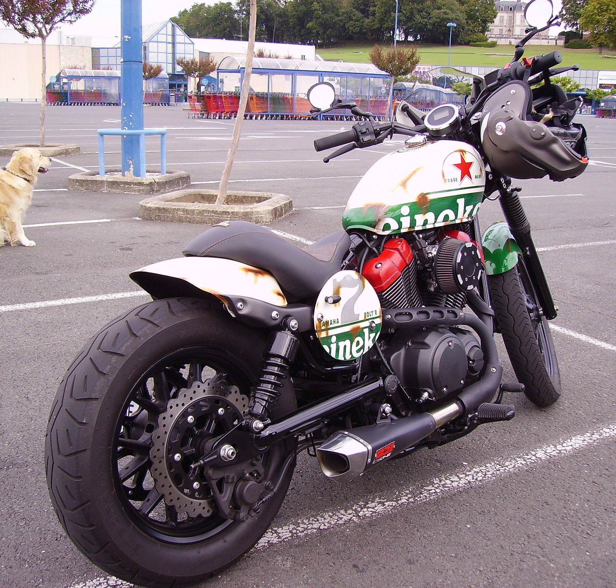 Yamaha XV 950 R « Bolt » avec décoration Heineken suggérée.